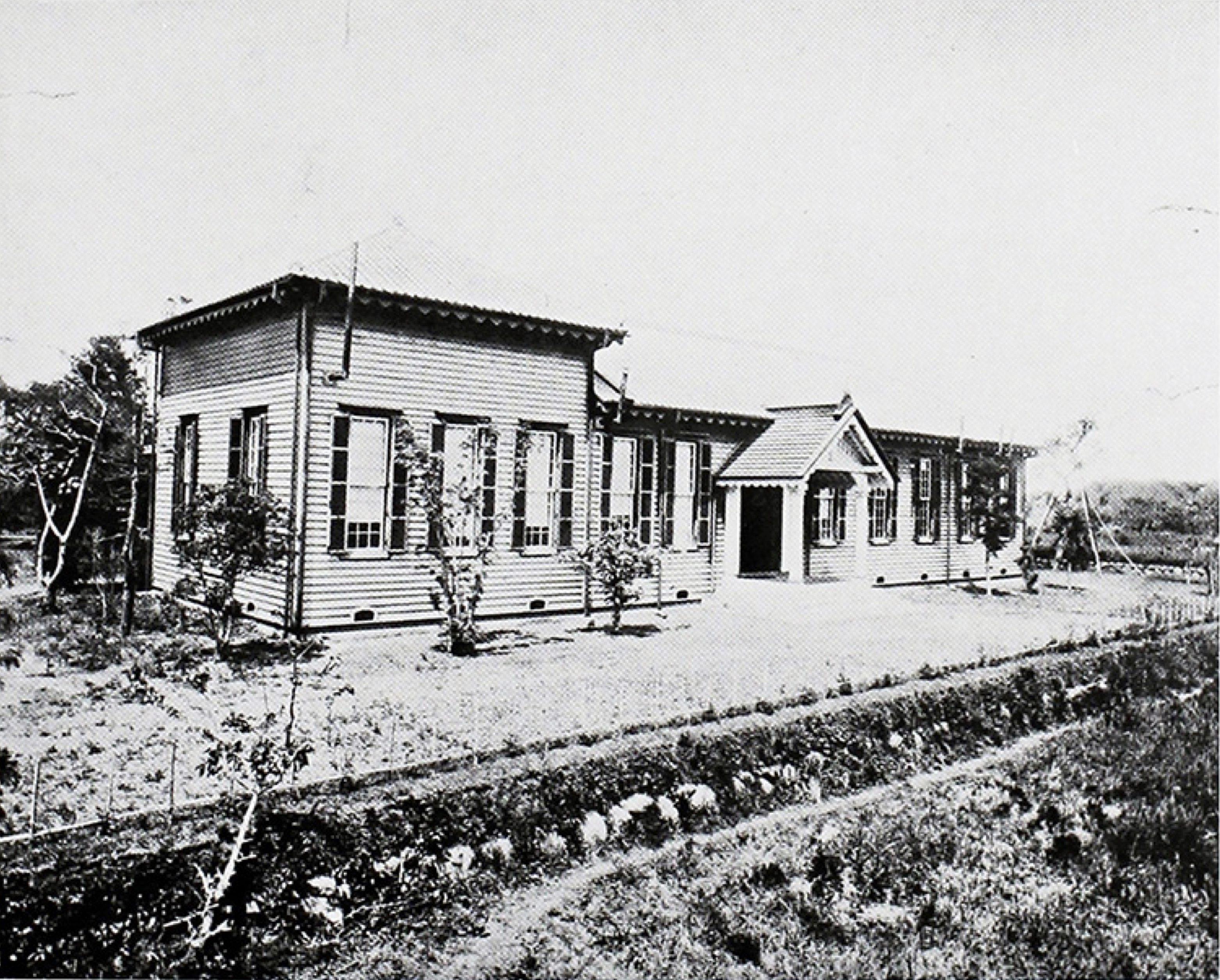 音楽取調掛（1879年〜1887年）本郷区文部省用地内第 十六番館